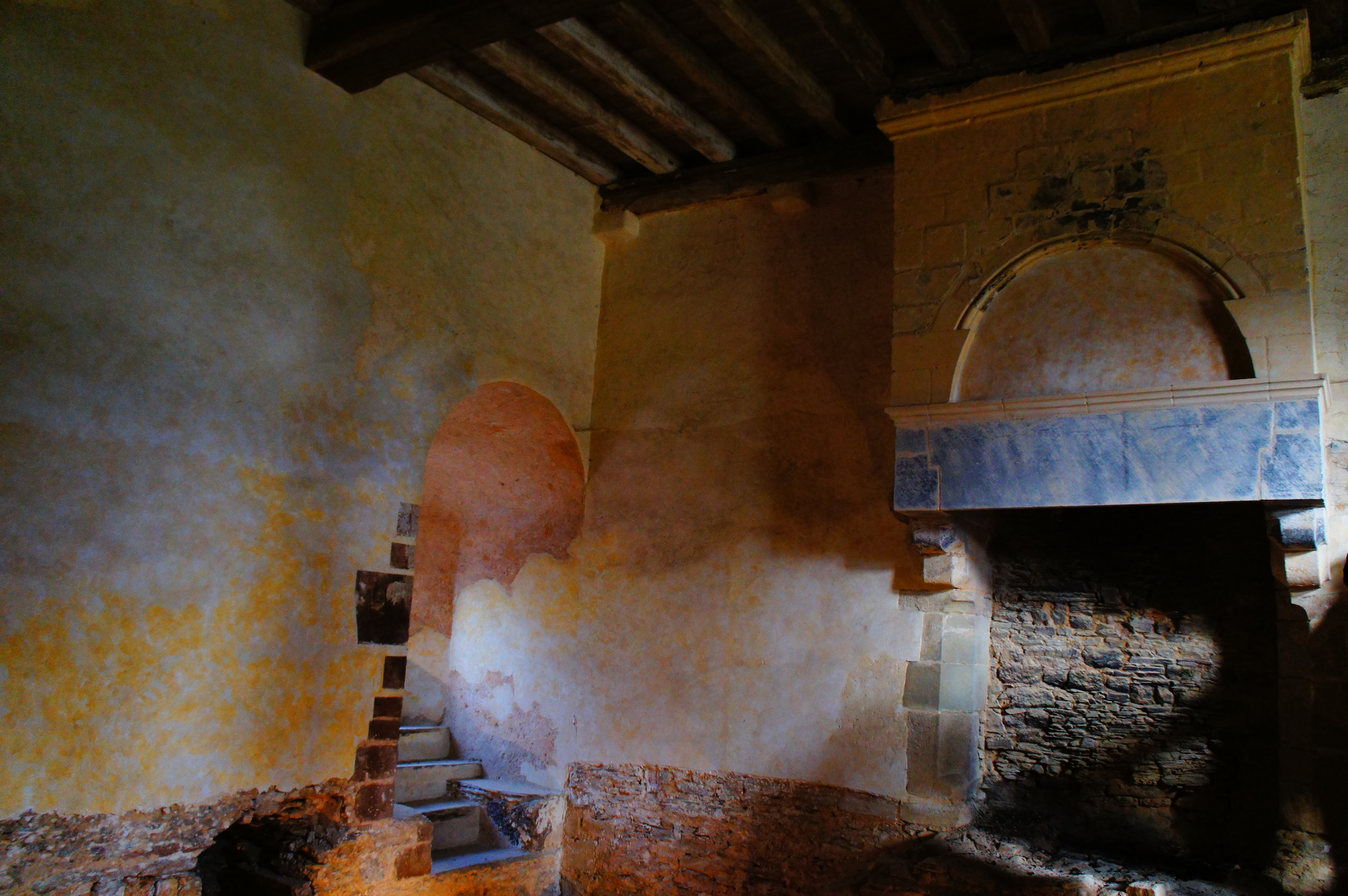 Chateau de Chateaubriant en Loire-Atlantique